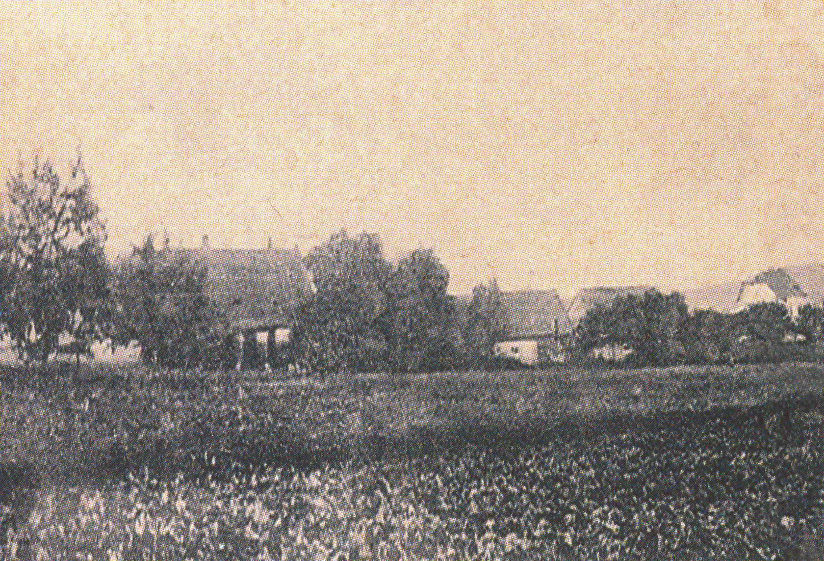 Ehemaliger Schmalzhof im Bezirk Most (Brüx)